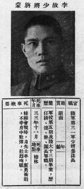 中文（台灣）: 抗戰軍人忠烈錄第一輯中的烈士遺像